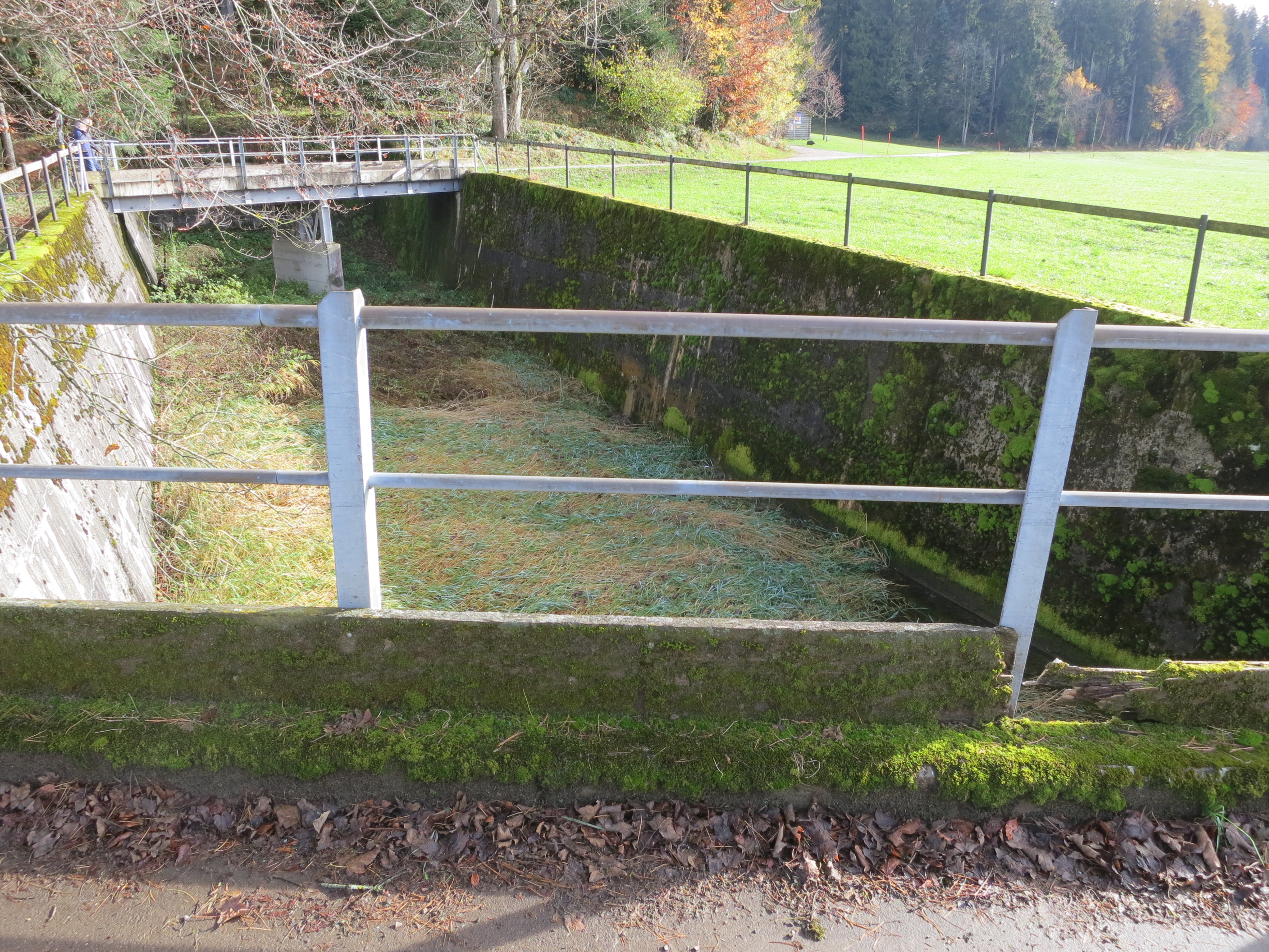 Tankgraben Sperrstelle Zugerberg, Zug ZG, Schweiz